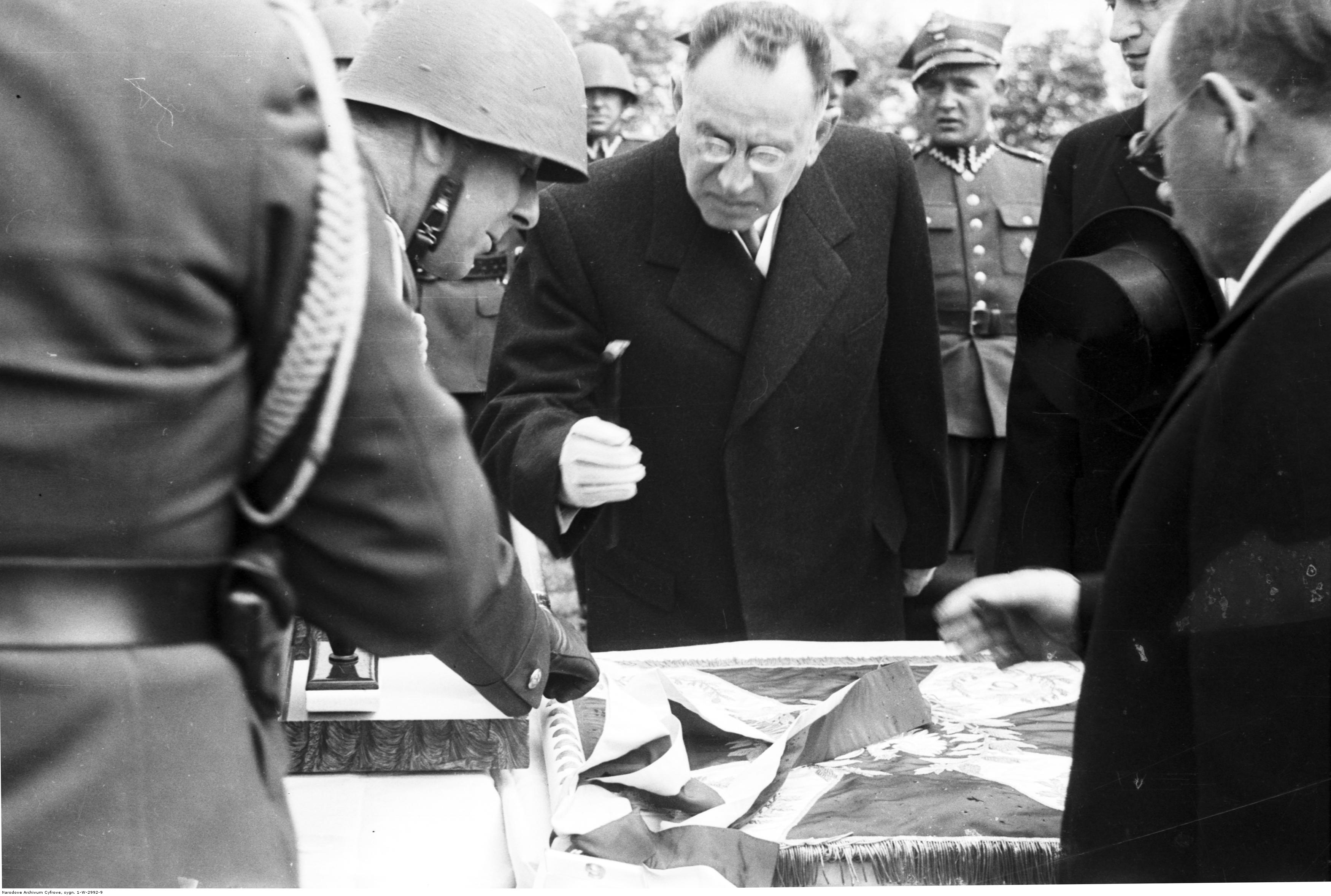 Wręczenie i poświęcenie sztandarów pułkom artylerii na krakowskich Błoniach. Prezydent Krakowa Mieczysław Kaplicki wbija pamiątkowy gwóźdź w drzewce sztandaru 6 Pułku Artylerii Lekkiej. Obok widoczna księga pamiątkowa. Koncern Ilustrowany Kurier Codzienny - Archiwum Ilustracji. Sygnatura: 1-W-2992-9